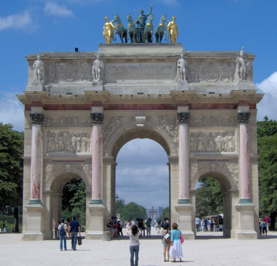 Arc de Triomphe du Carrousel